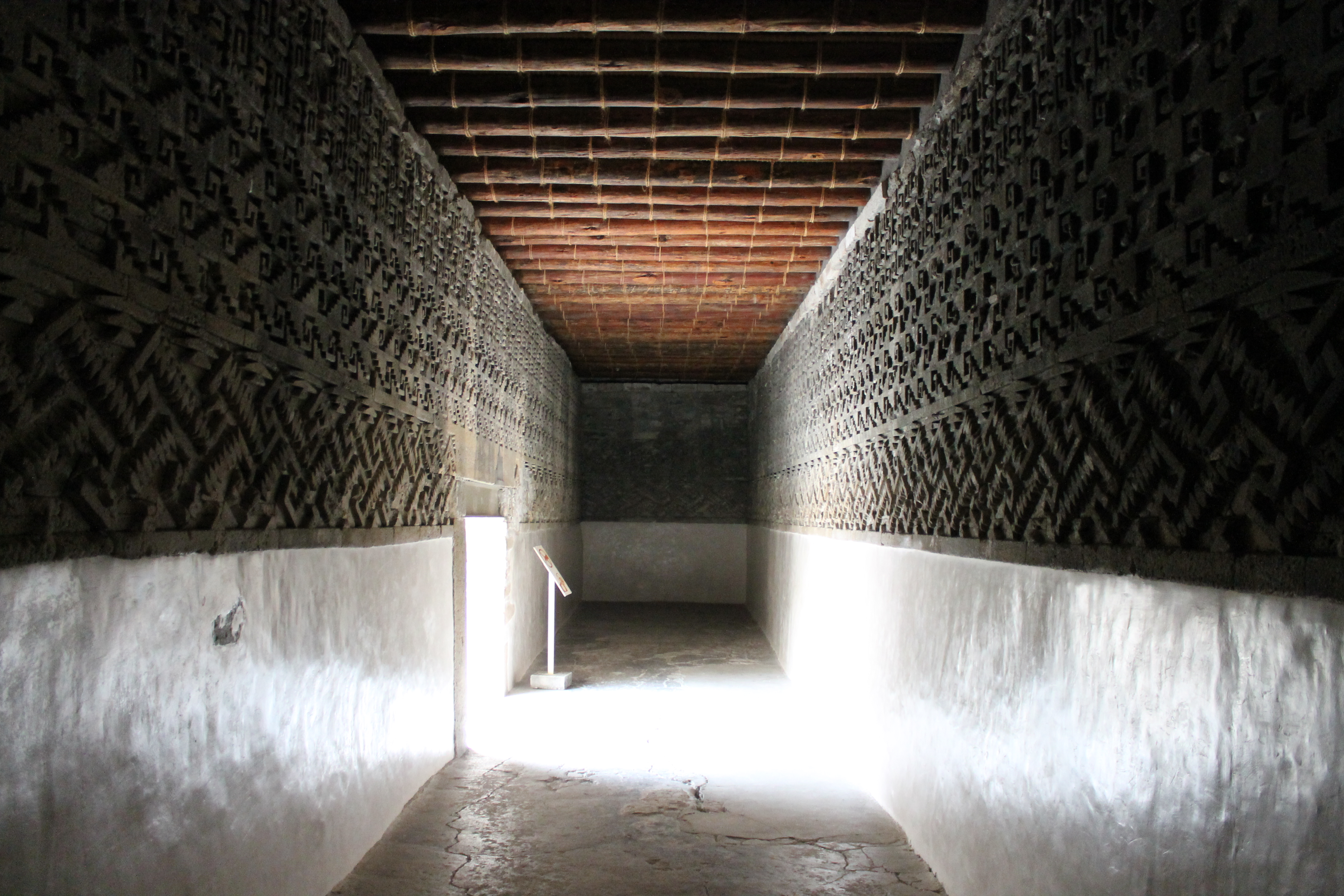 Se muestra el interior de una de las habitaciones del Palacio ubicado en el Grupo de las Columnas.